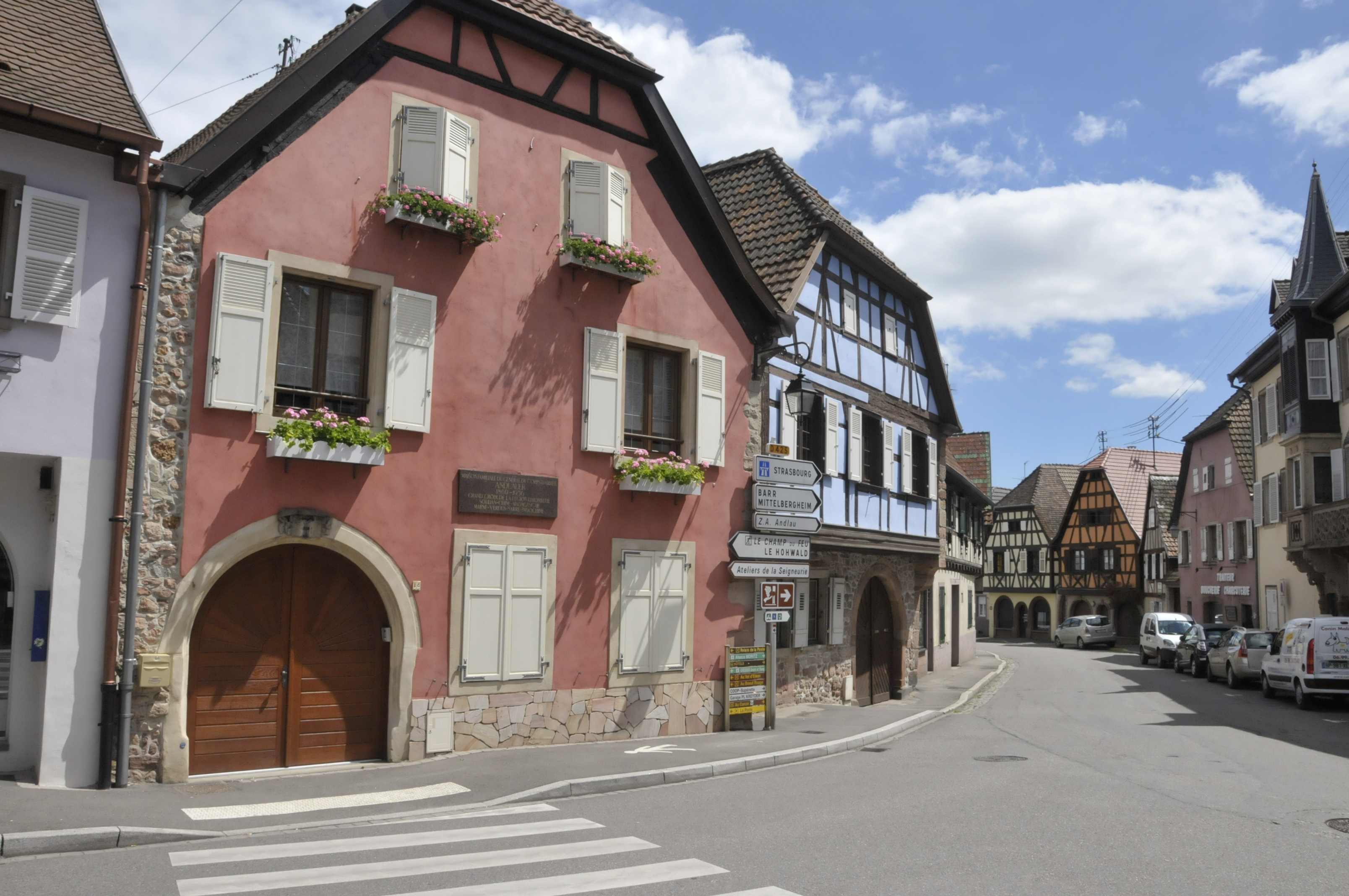 Andlau, Blick in die Rue du Maréchal Foch, links das Haus der Familie des Generals Joseph Louis Marie Andlauer